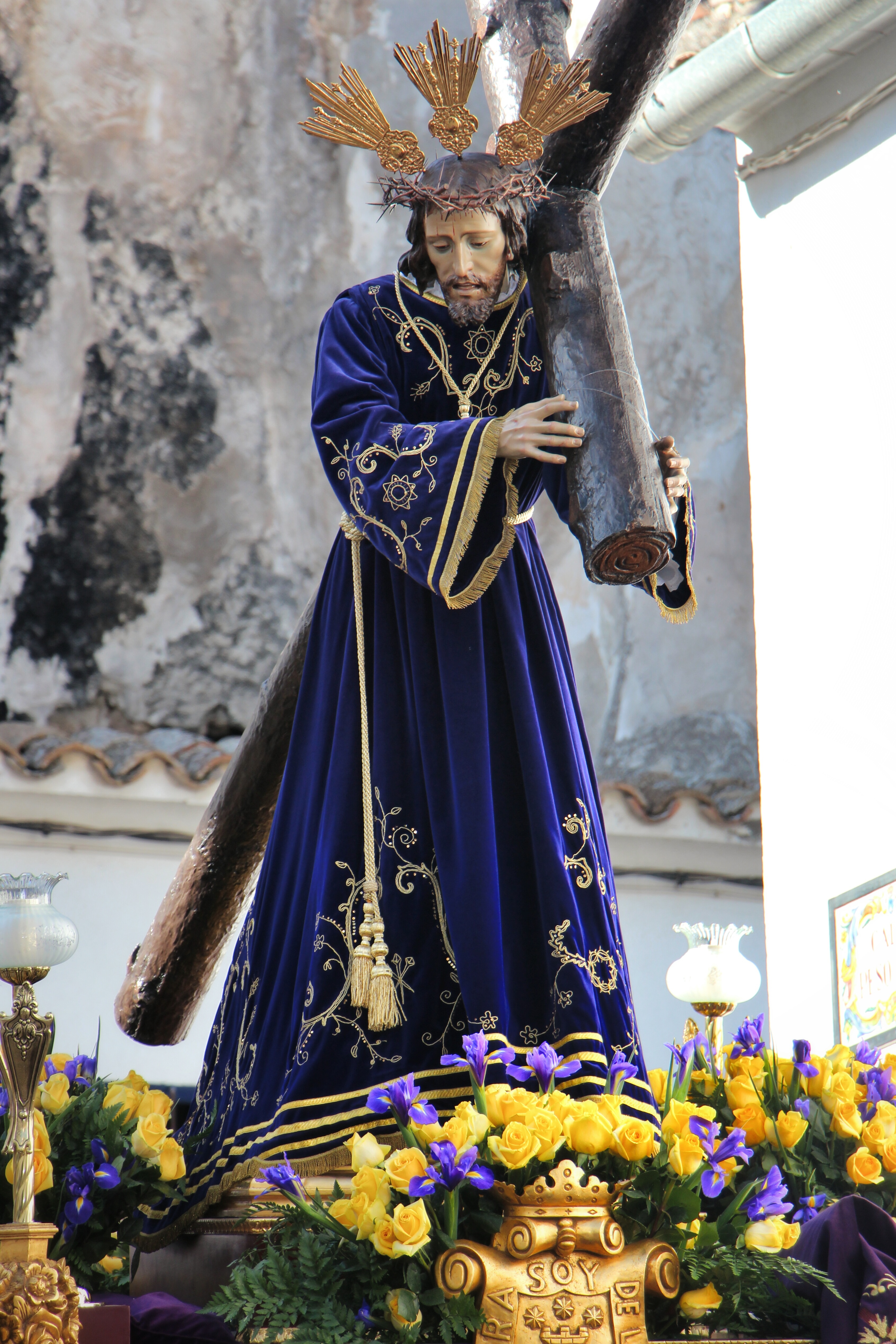 Semana Santa - Imagen del Nazareno de Ayora This is a photography of a Folklore festival in Spain (Wikidata id Q23663330).